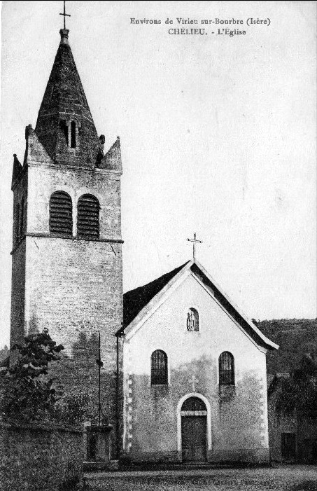 L'église. Chélieu, Isère, France. Environs de Virieu. Carte postale ancienne.